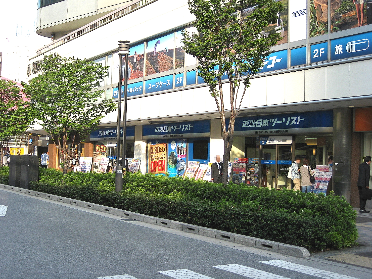 近畿日本ツーリスト個人旅行販売(株) 有楽町営業所 （東京交通会館1階、東京都千代田区）